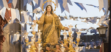 Salida 15 Agosto Asuncion Cantillana por las calles de su pueblo